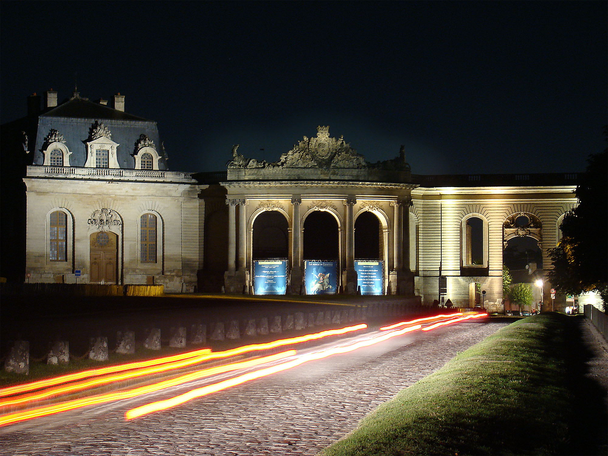 Chantilly, Oise, Picardie, France. Les Grandes Écuries.